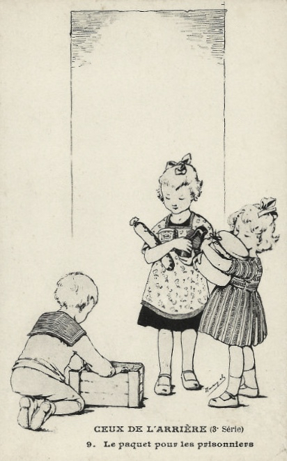 Le paquet pour les prisonniers, 1914-1918